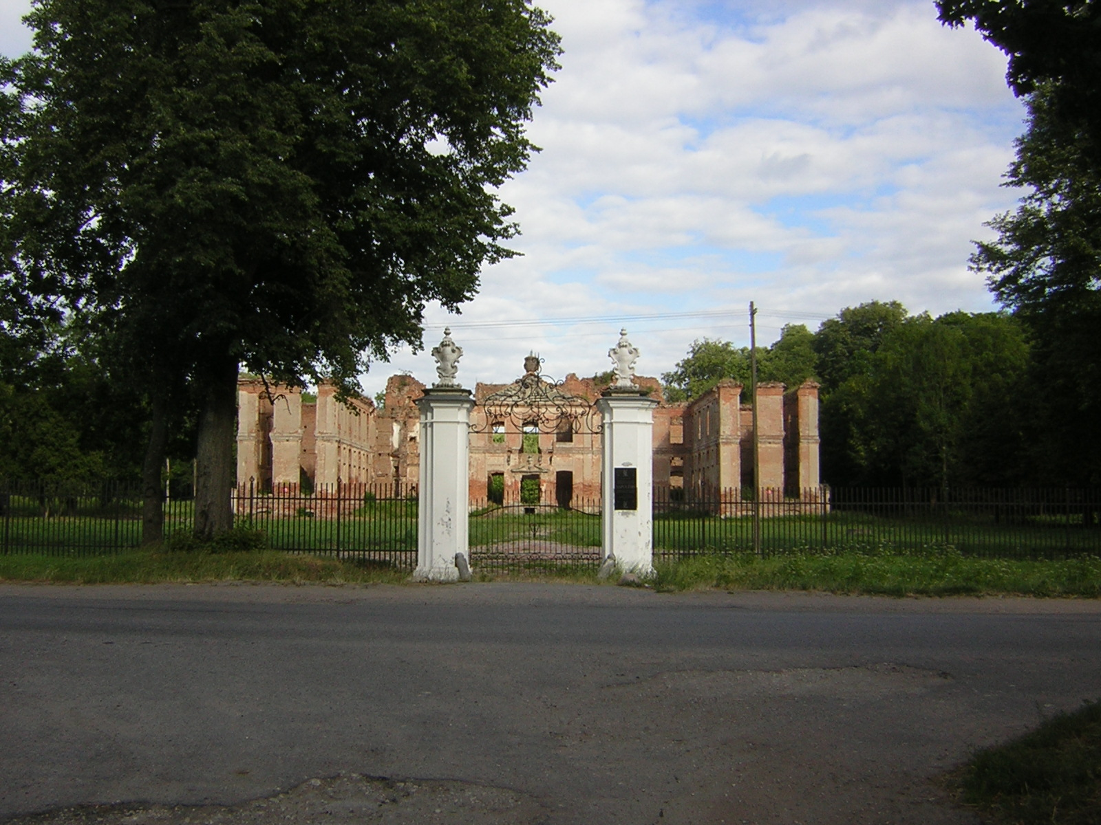 Pałac w Kamieńcu